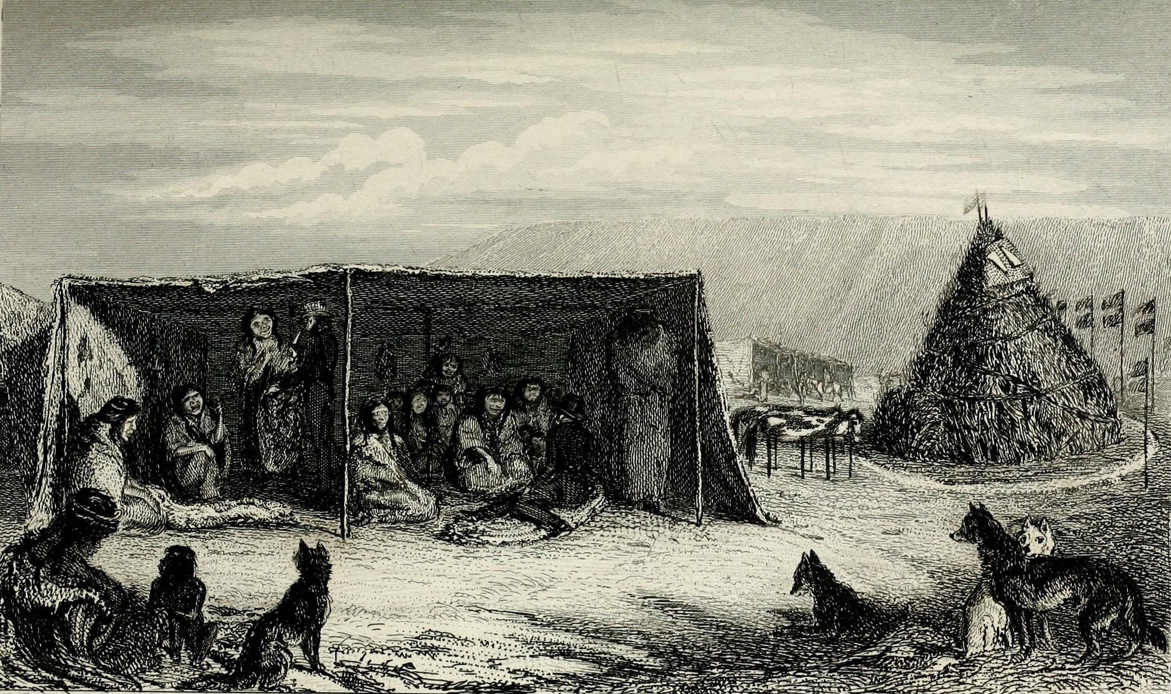 Tolderío de Patagones en Bahía Gregorio en 1827. Visita del almirante Phillip Parker King. Tomado de "Narrative of the surveying voyages of His Majesty's Ships Adventure and Beagle between the years 1826 and 1836, describing their examination of the southern shores of South America, and the Beagle's circumnavigation of the globe. Proceedings of the first expedition, 1826-30, under the command of Captain P. Parker King, R.N., F.R.S. London: Henry Colburn."